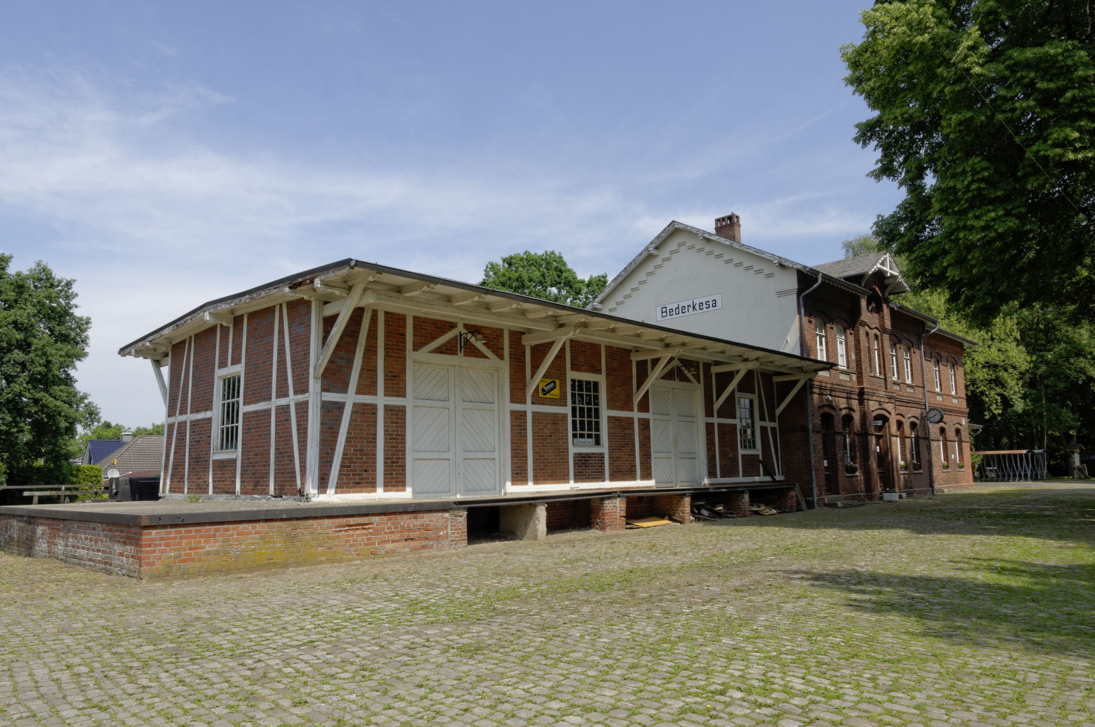 Der Bahnhof von Bederkesa, heute Sitz der Museumsbahn Bremerhaven - Bederkesa e.V.